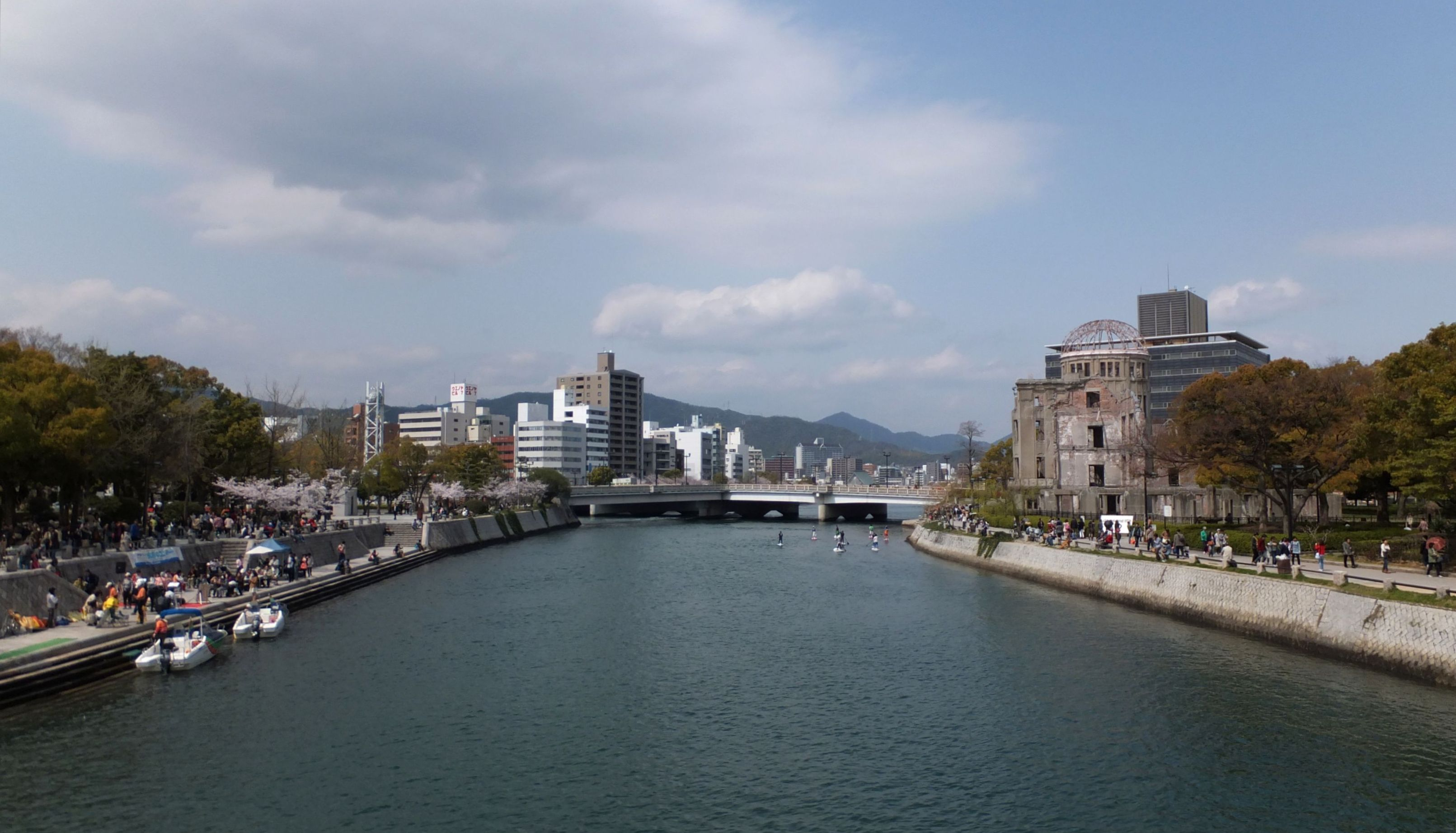 元安川。左にあるのは原爆ドーム。